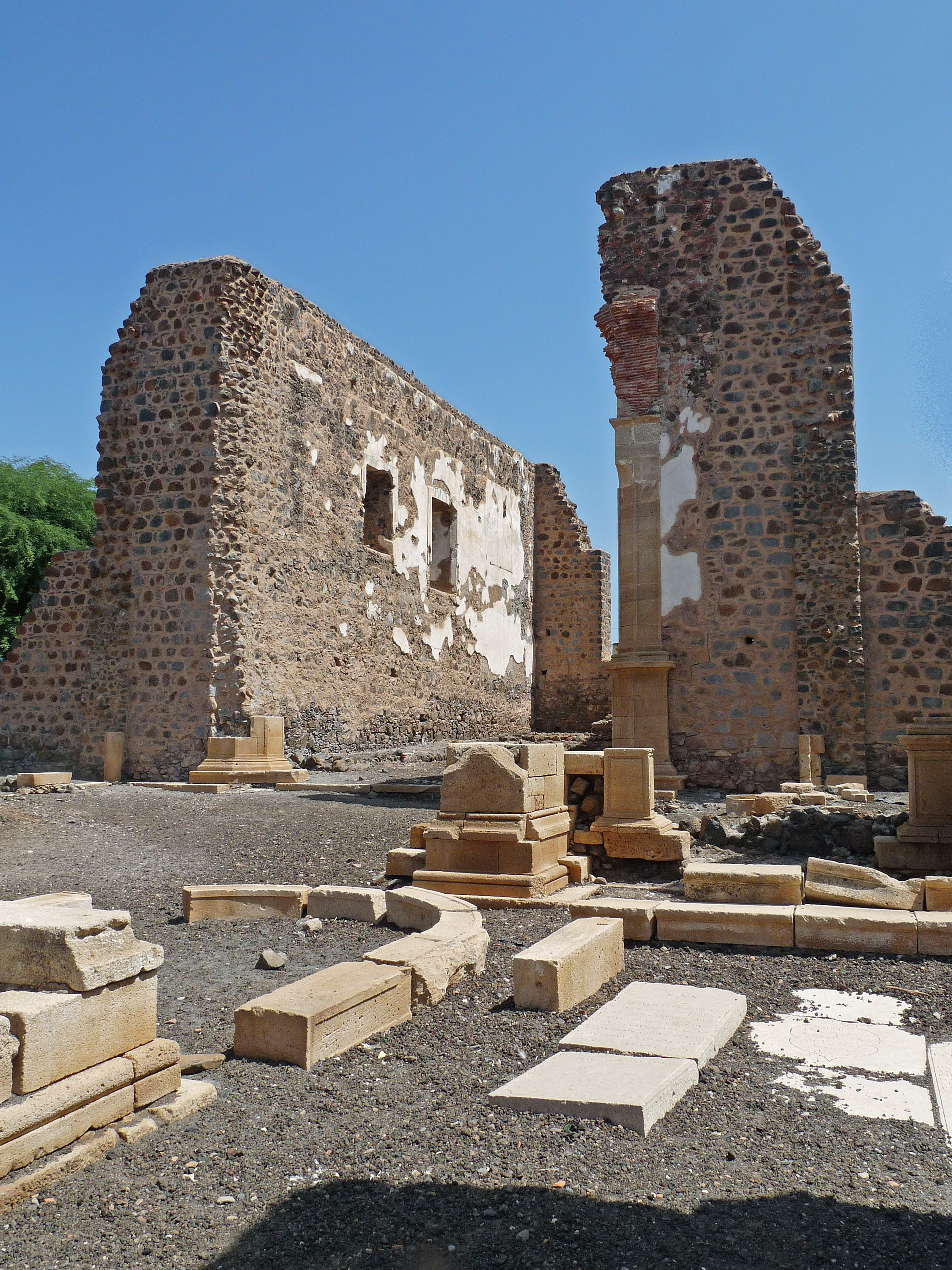 Cidade Velha (île de Santiago, Cap-Vert) : ruines de Sé Catedral